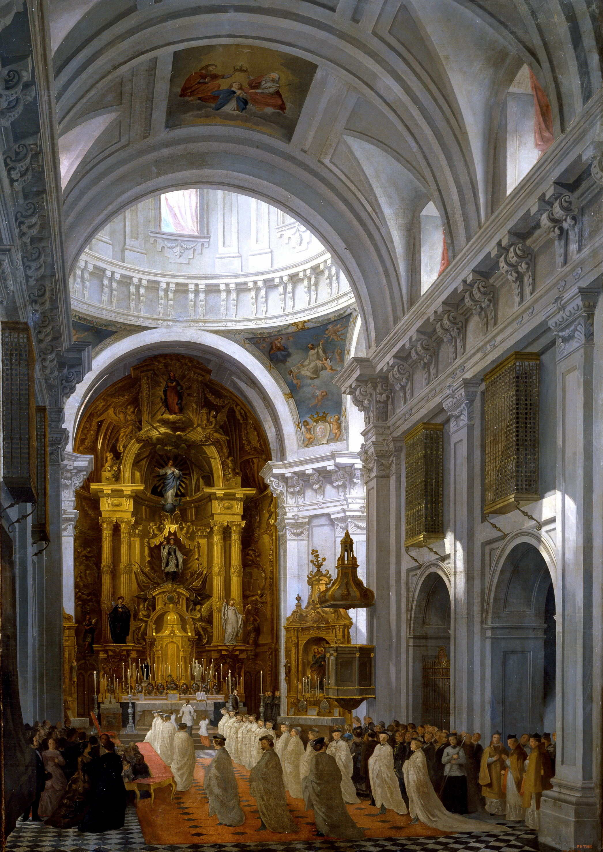 La obra representa el interior de la iglesia de las Calatravas de la ciudad de Madrid, (España). Fue pintado en la segunda mitad del siglo XIX por Francisco Hernández Tomé, y se conserva en el Museo del Prado.